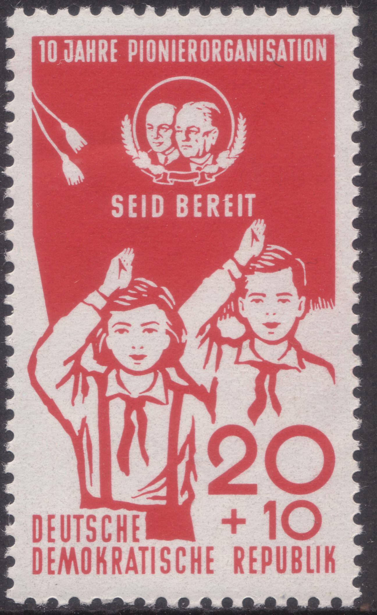 Stamp description / Briefmarkenbeschreibung